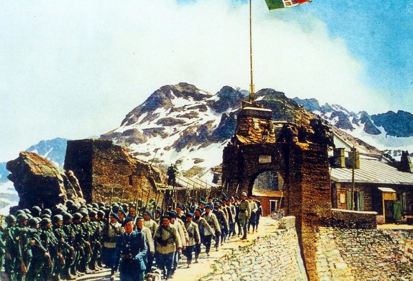 La guarnigione francese abbandona il fote